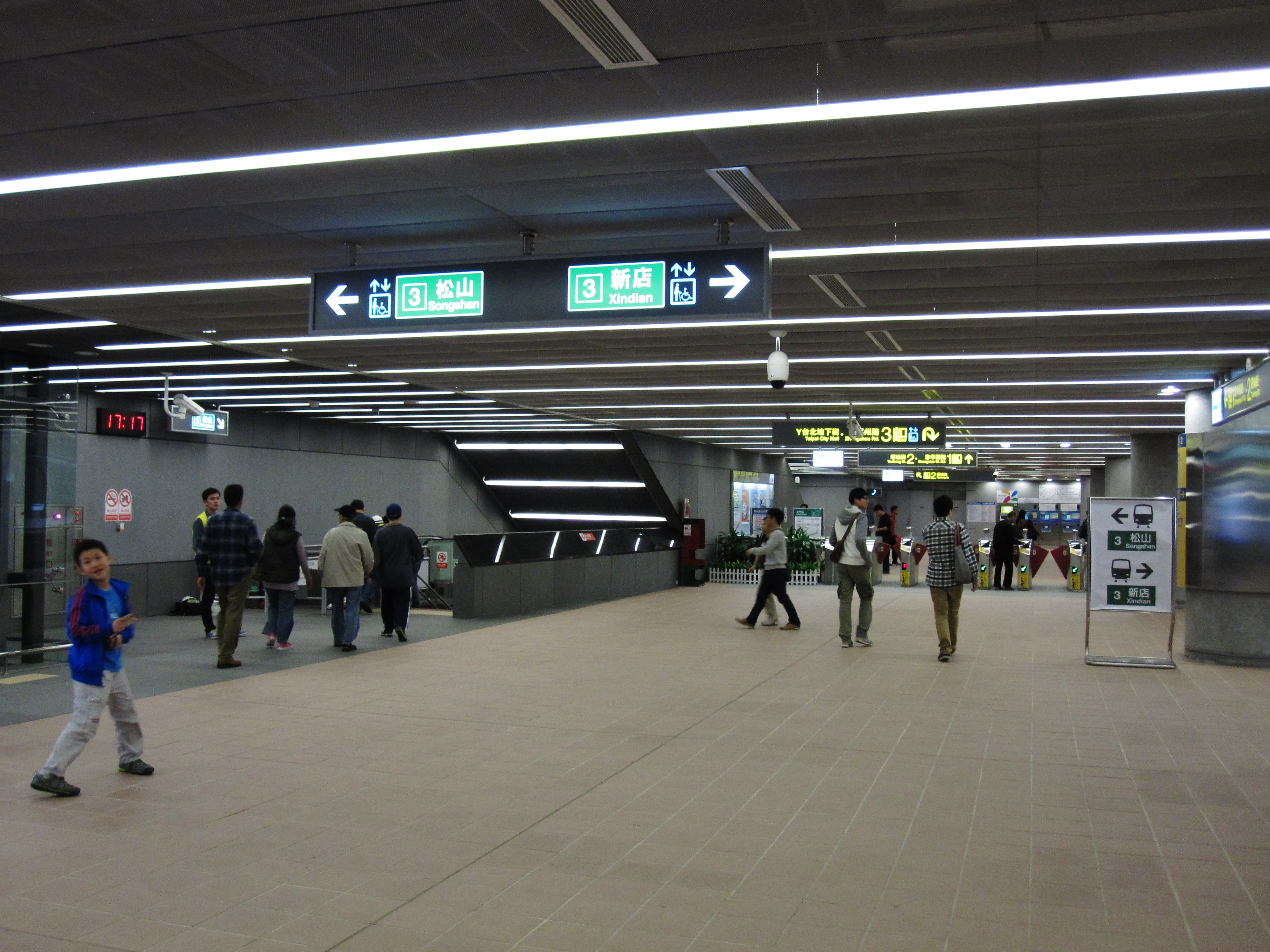 中文（台灣）: 捷運松山線北門站穿堂層